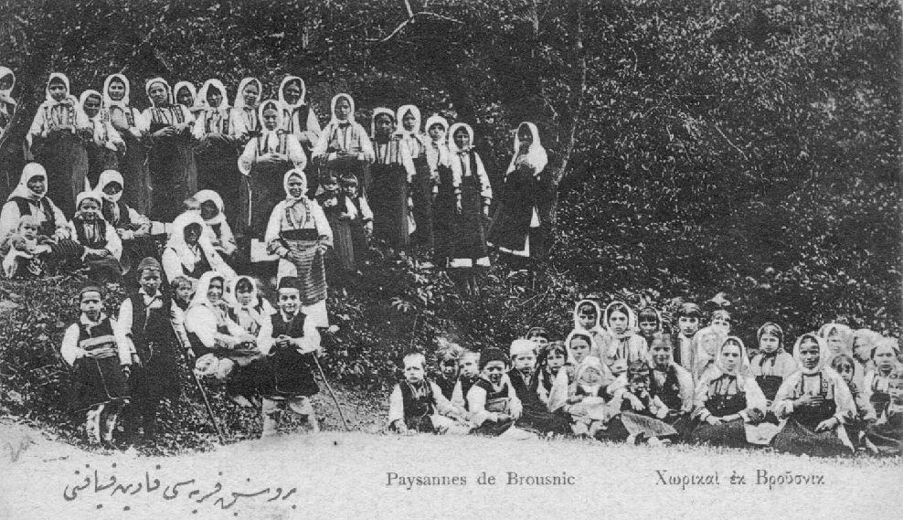 Селяни от Брусник, Битолско